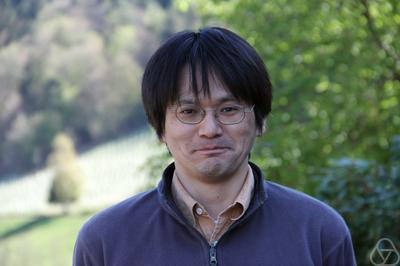 Foto di Takurō Mochizuki